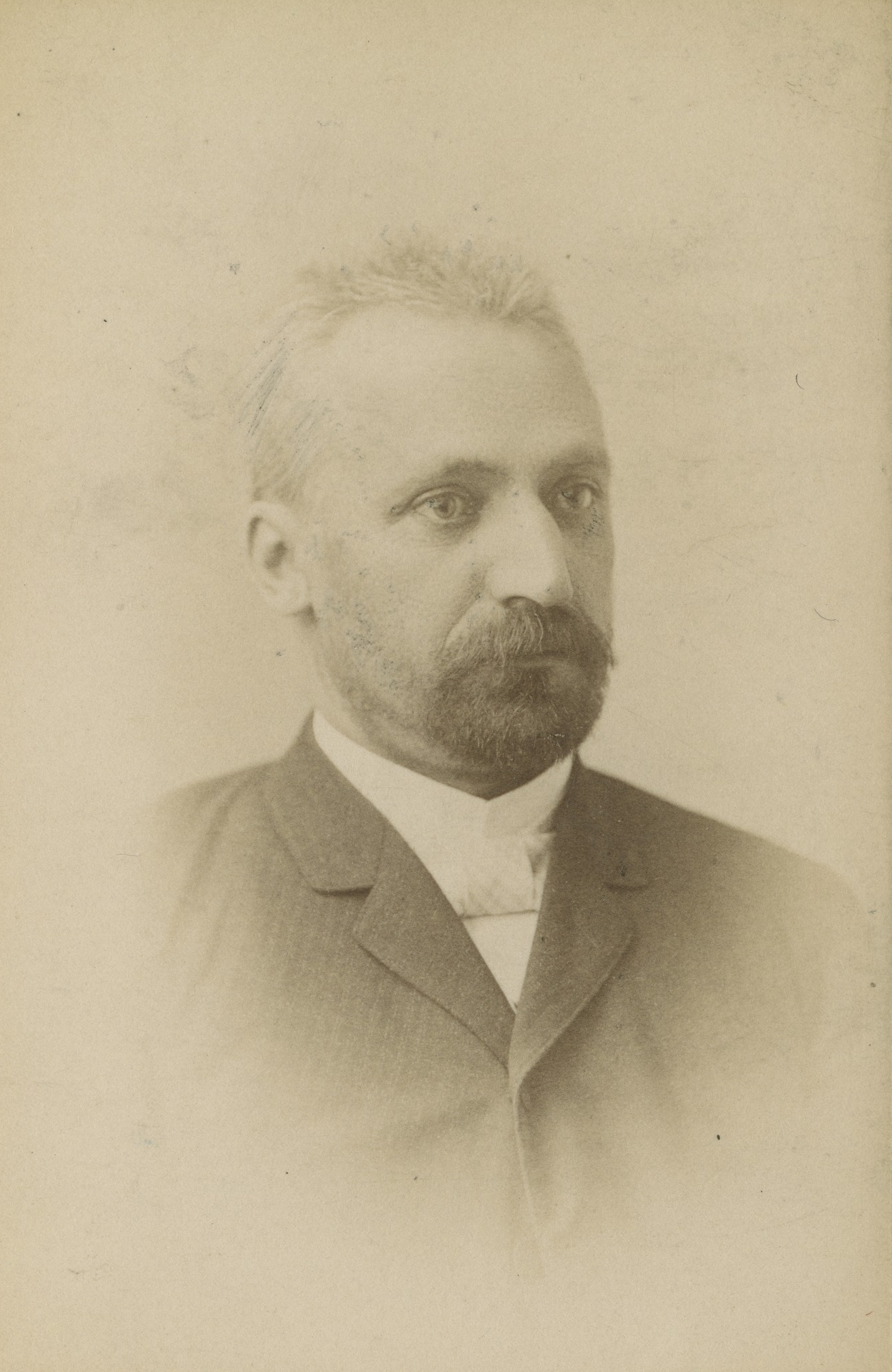 Portret Antoniego Kaliny